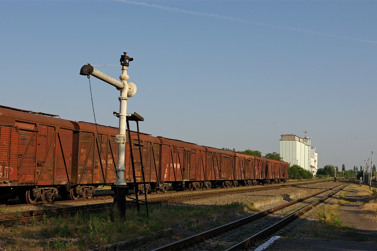 станция Атаман